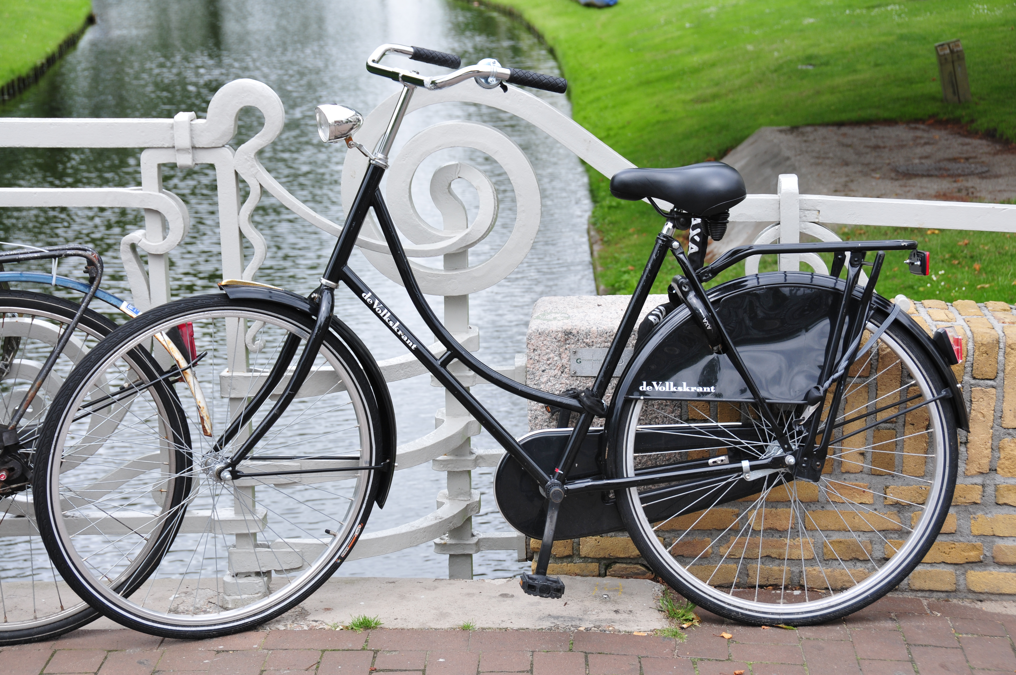 Rotterdam, Niederlande, 2013